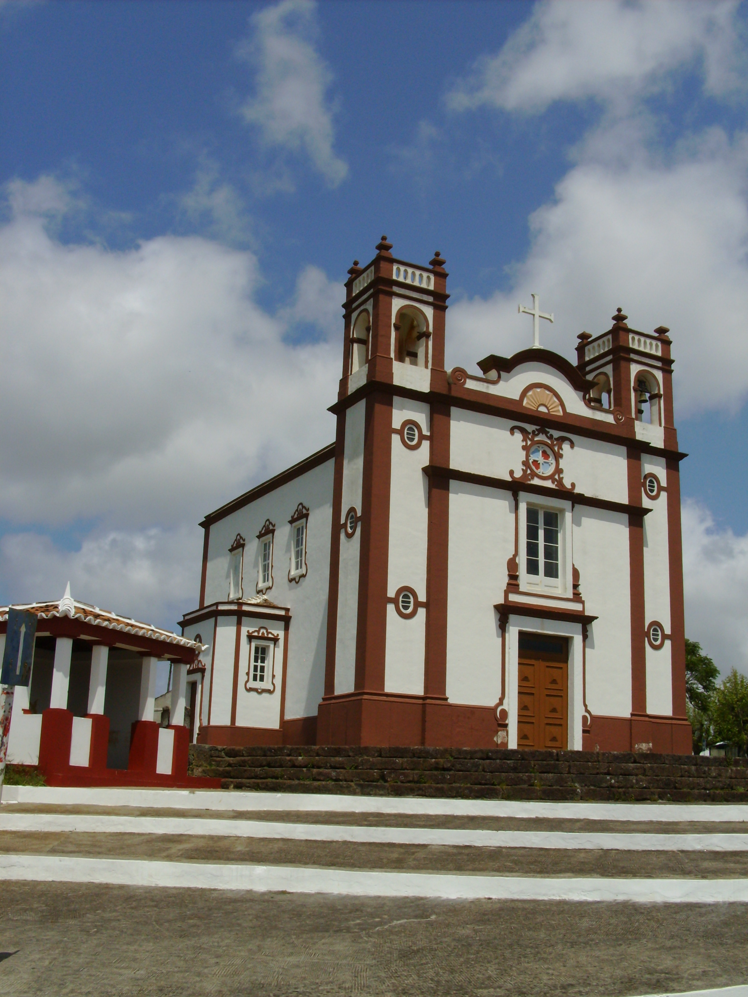 Igreja de Santo Antão, Vila do Porto, freguesia da Vila do Porto, concelho da Vila do Porto, ilha de Santa Maria, nos Açores: lateral esquerda.